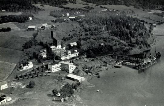 Fosdalens bergverk i Malm. Reprofoto.